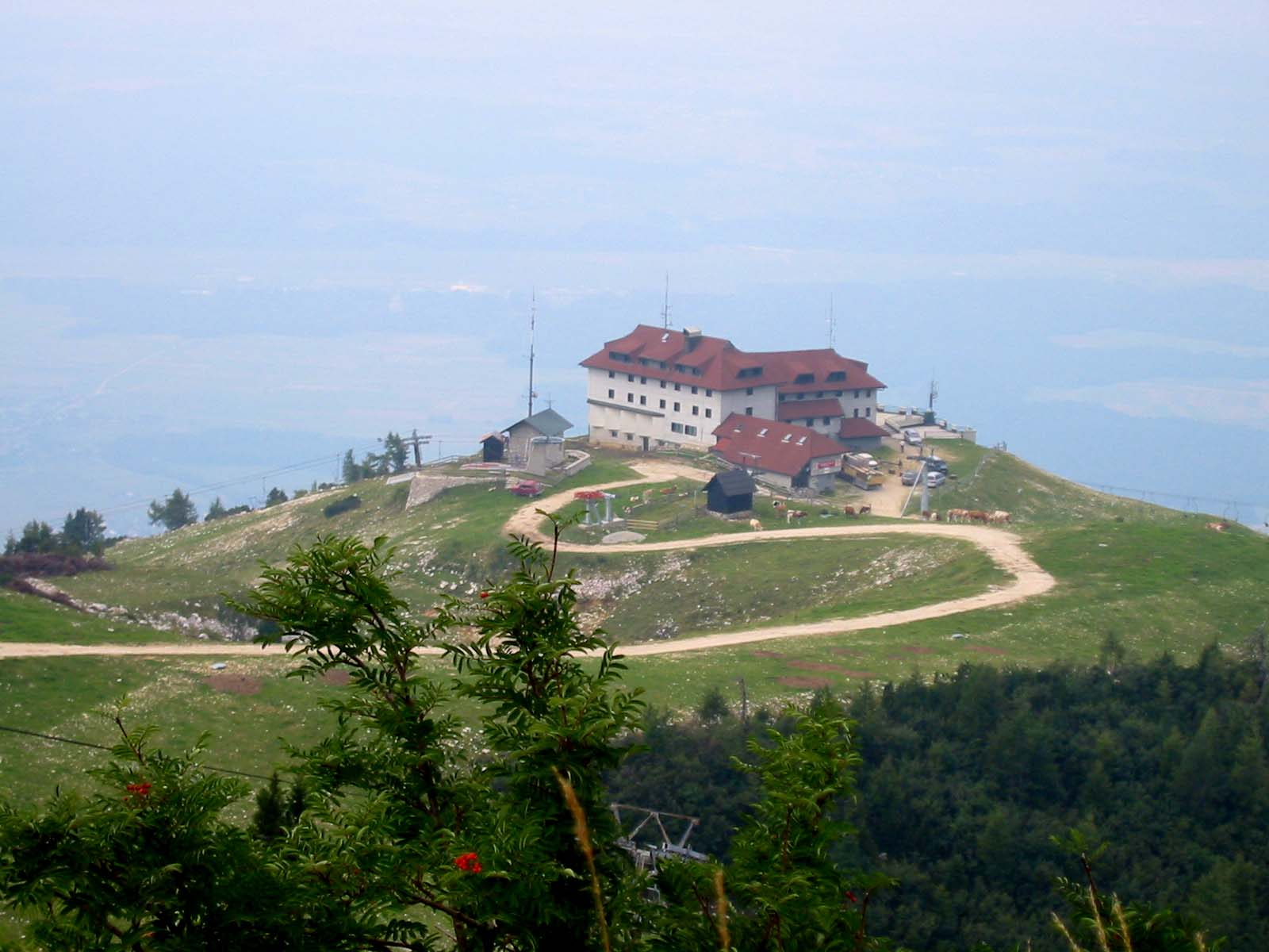 Krvavec, alpine hut (hotel) at the ski-ground Krvavec (mountain in Slovenia) photo:Ziga 10:49, 16 April 2007 (UTC)